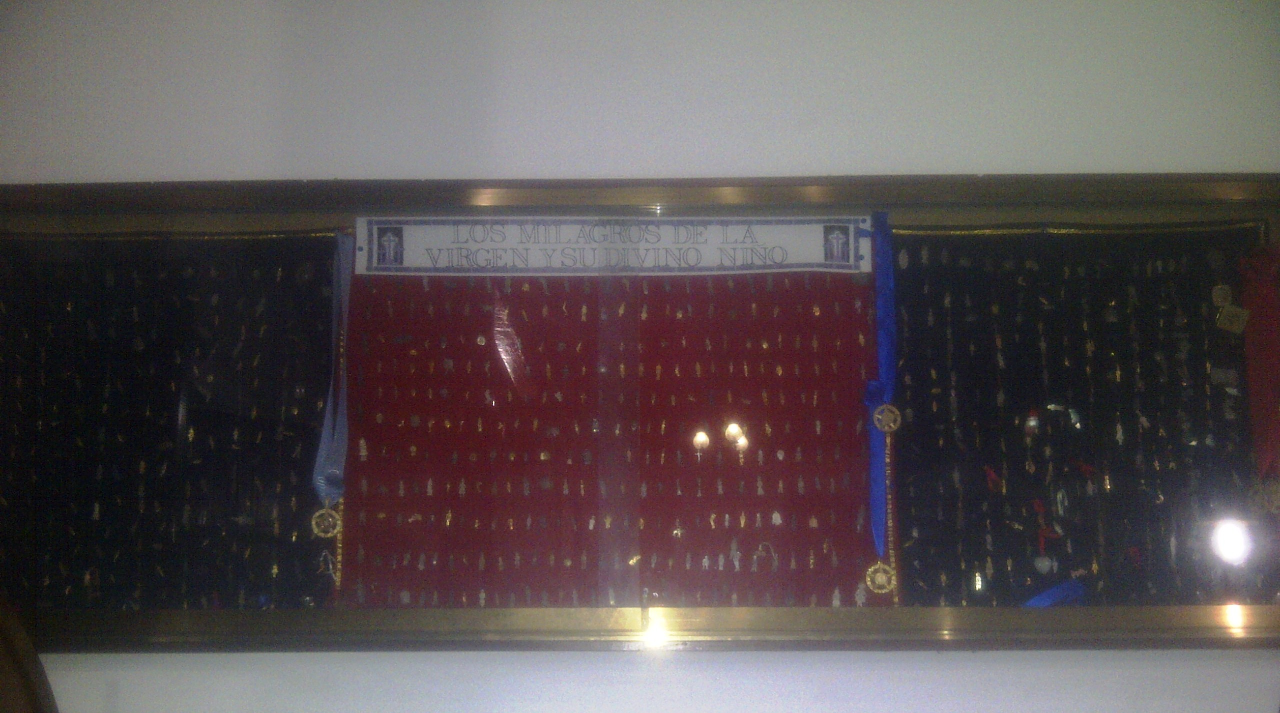 Exvotos a Santa Maria del Amparo,Expuestos en el Santuario Mariano Nuestra Señora del Amparo de Pozuelos,Anzoategui, Venezuela